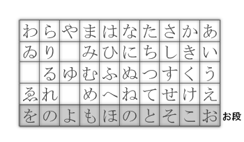 中文（台灣）: お段在日語五十音圖中的位置。